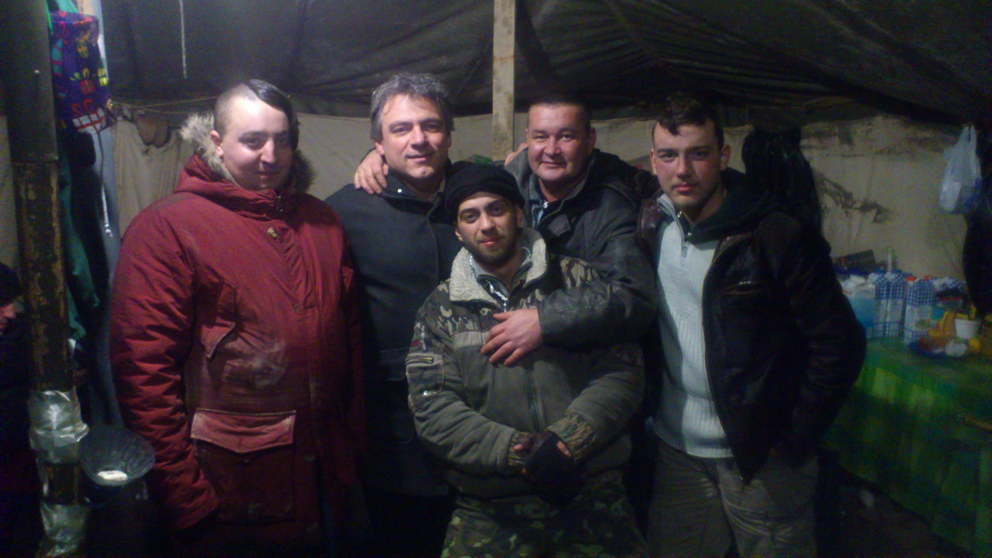 Миколаївці із Самооборони Майдану на Майдані Незалежності в ніч з 19 на 20 лютого 2014